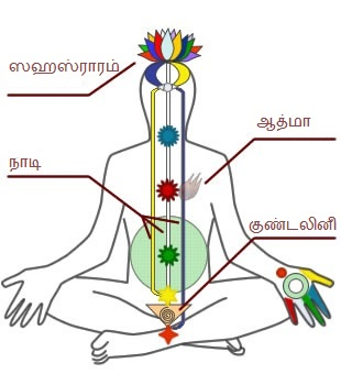 குண்டலினி